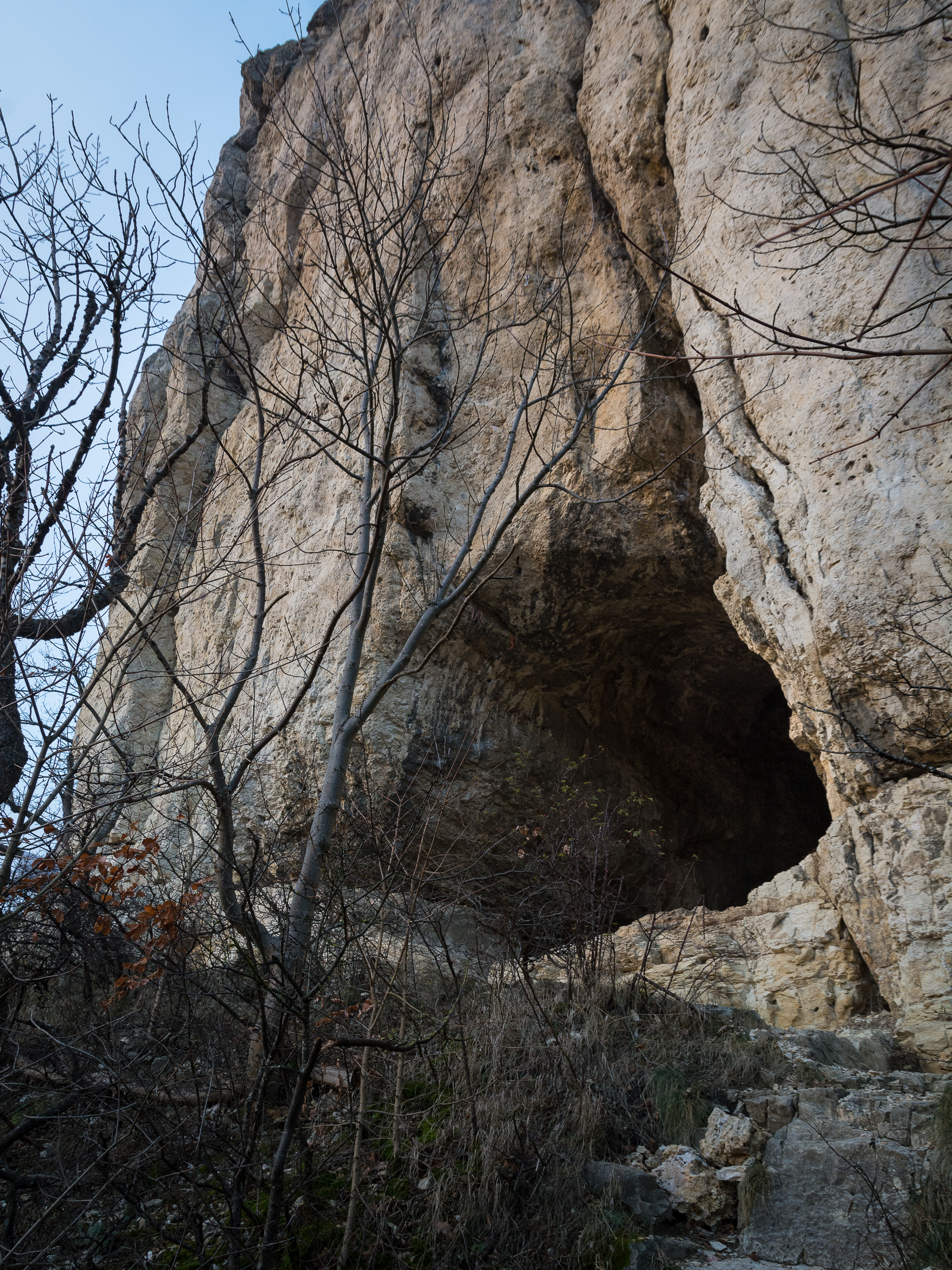 Die Kleine Scheuer am Rosenstein bei Heubach, Baden-Württemberg, Deutschland.